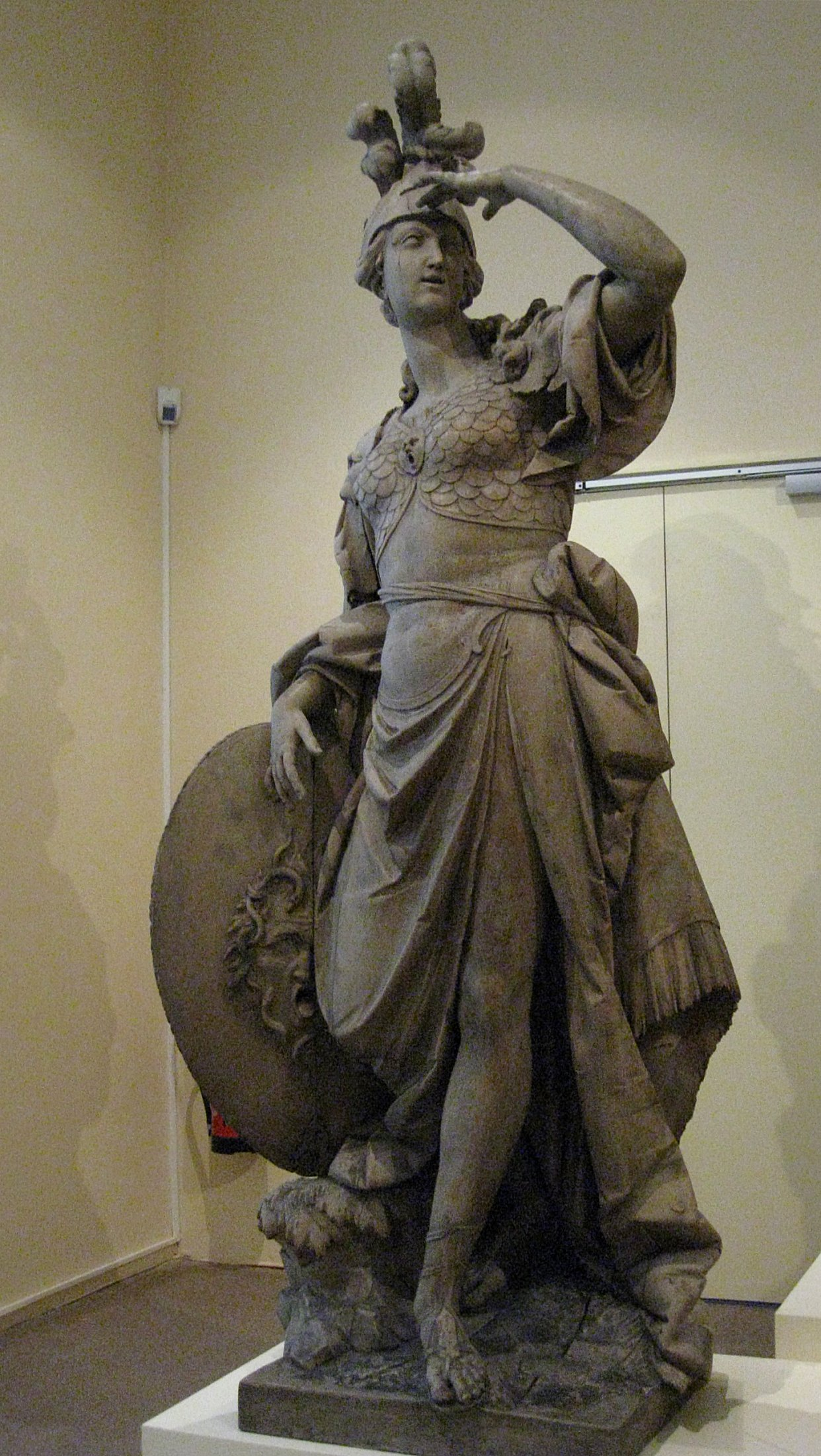 Johann Baptist Straub: Minerva, um 1772, Lindenholz, Bayerisches Nationalmuseum in München